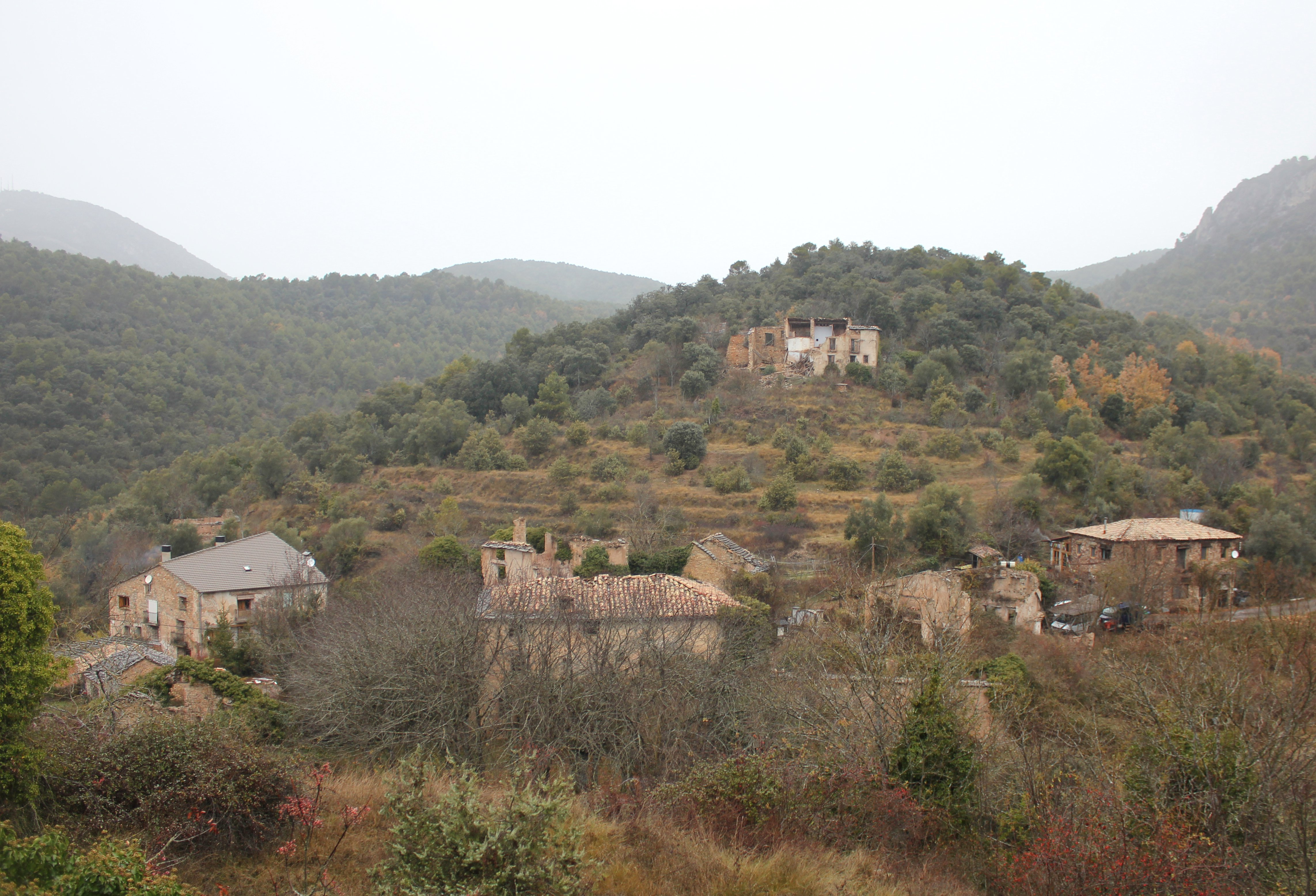 Aragonés: As casas dispersas de Trillo (A Fueva, Sobrarbe).